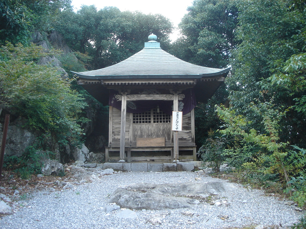 Myoujyourinji01(Temple)(明星輪寺、ざおうごんげんしゃ),Ogaki,Gifu,Japan(岐阜県大垣市)で撮影